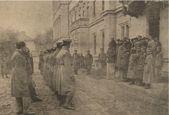 Szkoła Kadetów